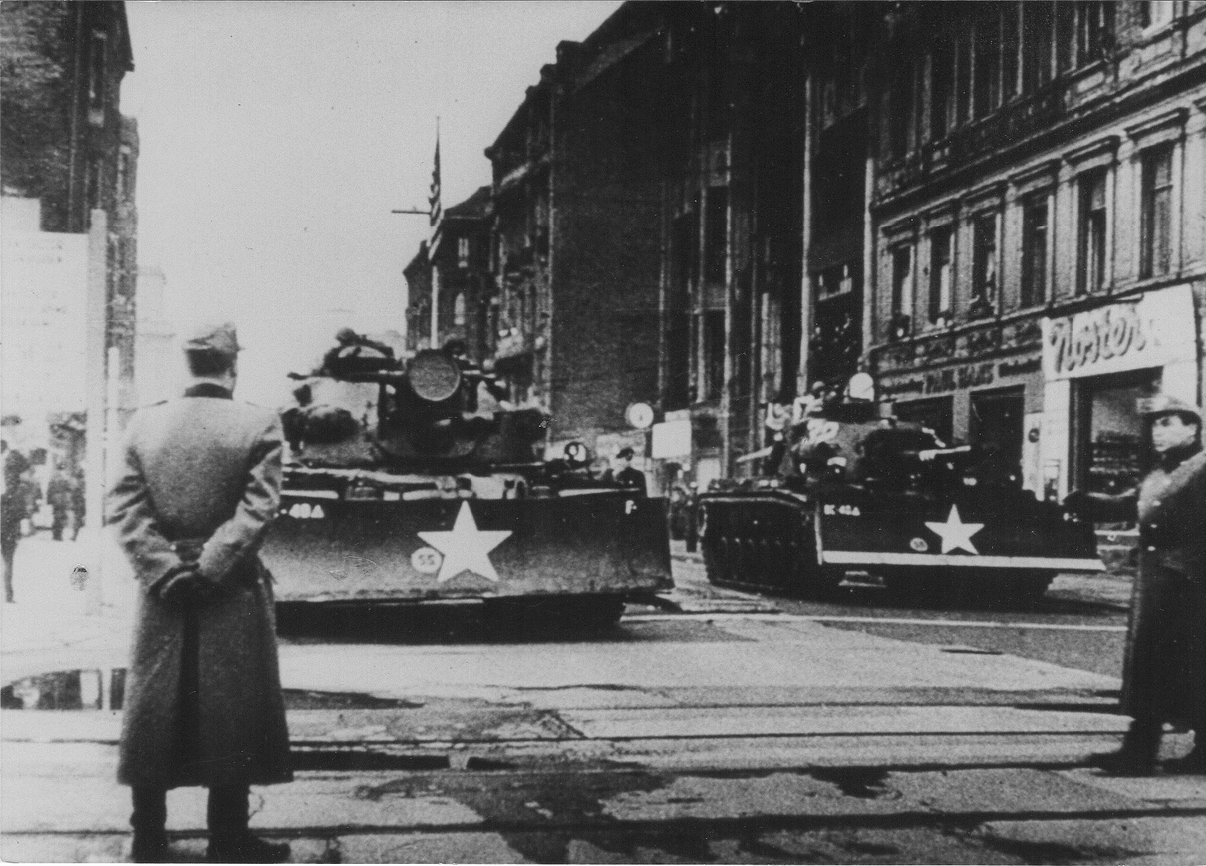 Amerikanische M48 Panzer. Gemacht von der DDR aus. Die Grenze verläuft unmittelbar am Frontende der Panzer.